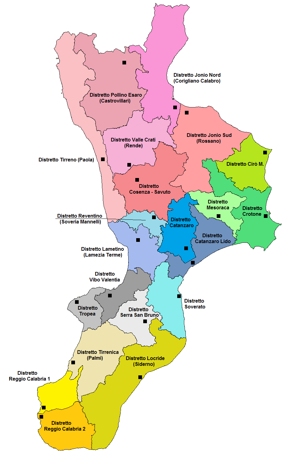 Mappa con le Aziende Sanitarie Provinciali della Calabria: Azienda Sanitaria Provinciale di Cosenza Distretto Cosenza-Savuto; Distretto Jonio Nord (con sede a Corigliano Calabro); Distretto Jonio Sud (con sede a Rossano); Distretto Pollino Esaro (con sede a Castrovillari); Distretto Tirreno (con sede a Paola); Distretto Valle Crati (con sede a Rende); Azienda Sanitaria Provinciale di Crotone Distretto Cirò Marina; Distretto Crotone; Distretto Mesoraca; Azienda Sanitaria Provinciale di Catanzaro Distretto Catanzaro; Distretto Catanzaro Lido; Distretto Lamezia Terme; Distretto Reventino (con sede a Soveria Mannelli); Distretto Soverato; Azienda Sanitaria Provinciale di Vibo Valentia Distretto Serra San Bruno; Distretto Tropea; Distretto Vibo Valentia; Azienda Sanitaria Provinciale di Reggio Calabria Distretto Locride (con sede a Siderno); Distretto Tirrenica (con sede a Palmi); Distretto Reggio Calabria Nord; Distretto Reggio Calabria Sud.